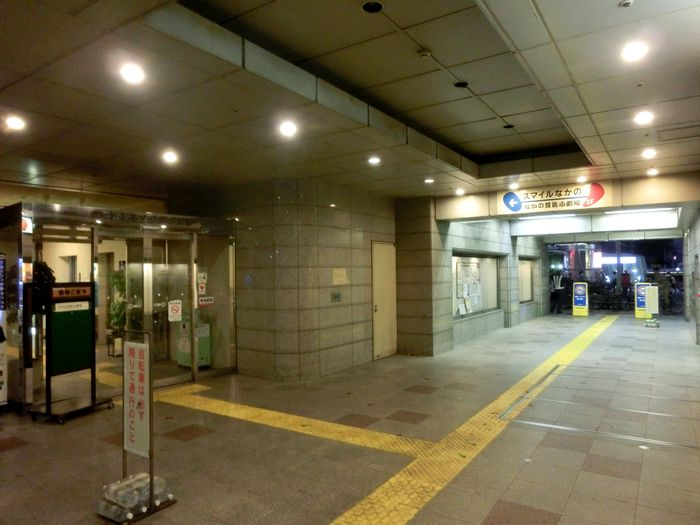 NAKANOGEINOUSHOHOOL2016